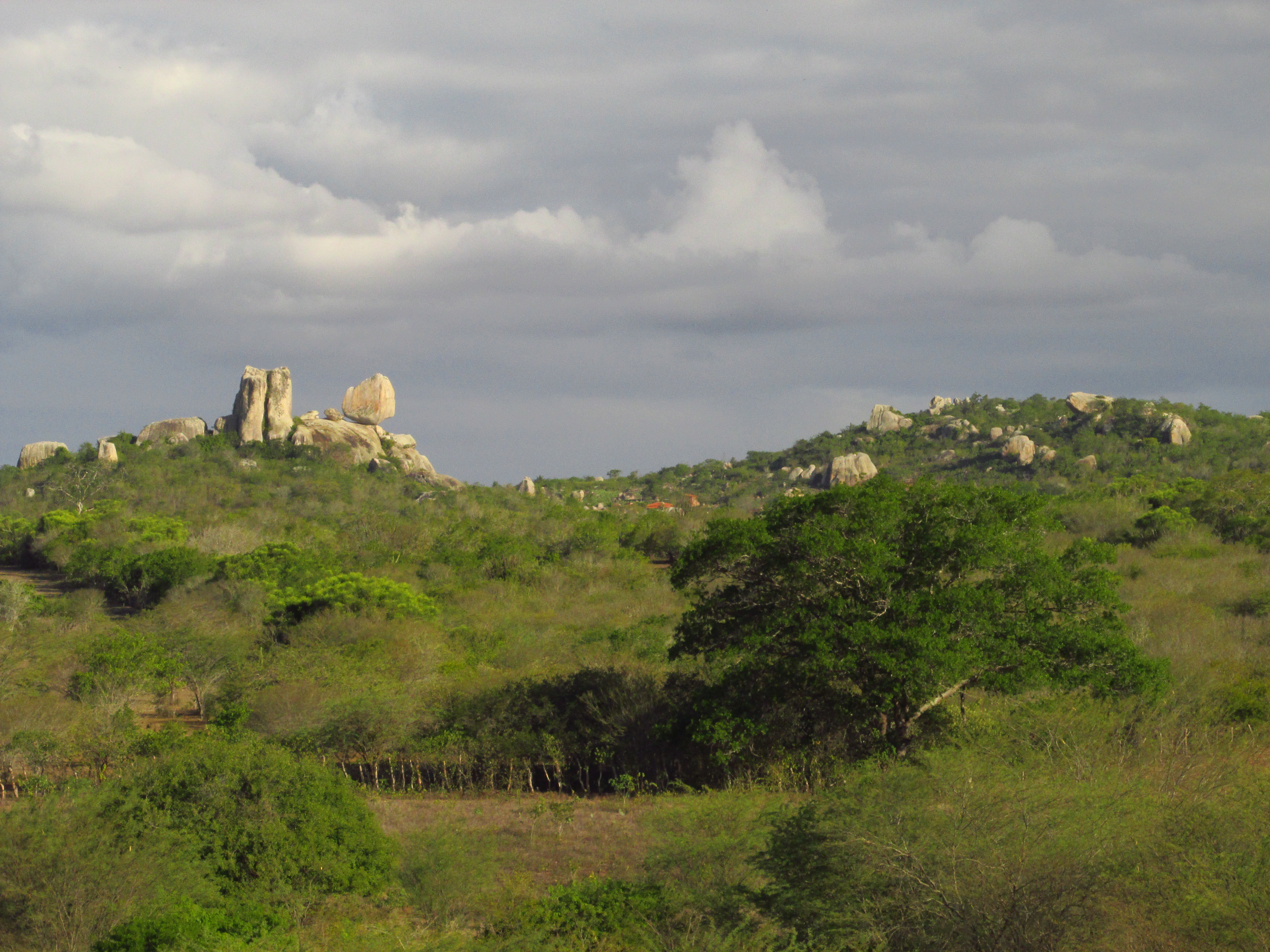 Formações rochosa da Serra da Borborema - Queimadas- Paraiba. Brazil. Situadas no Sítio Gravatá dos Trigueiros. Vista do Sítio Gravatá dos Veles